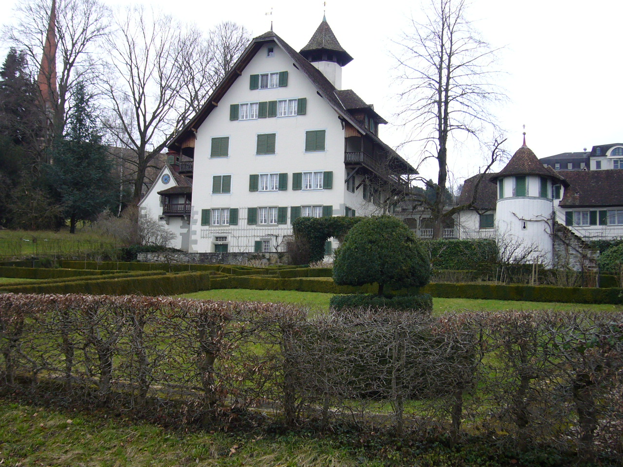 Zurlaubenhof